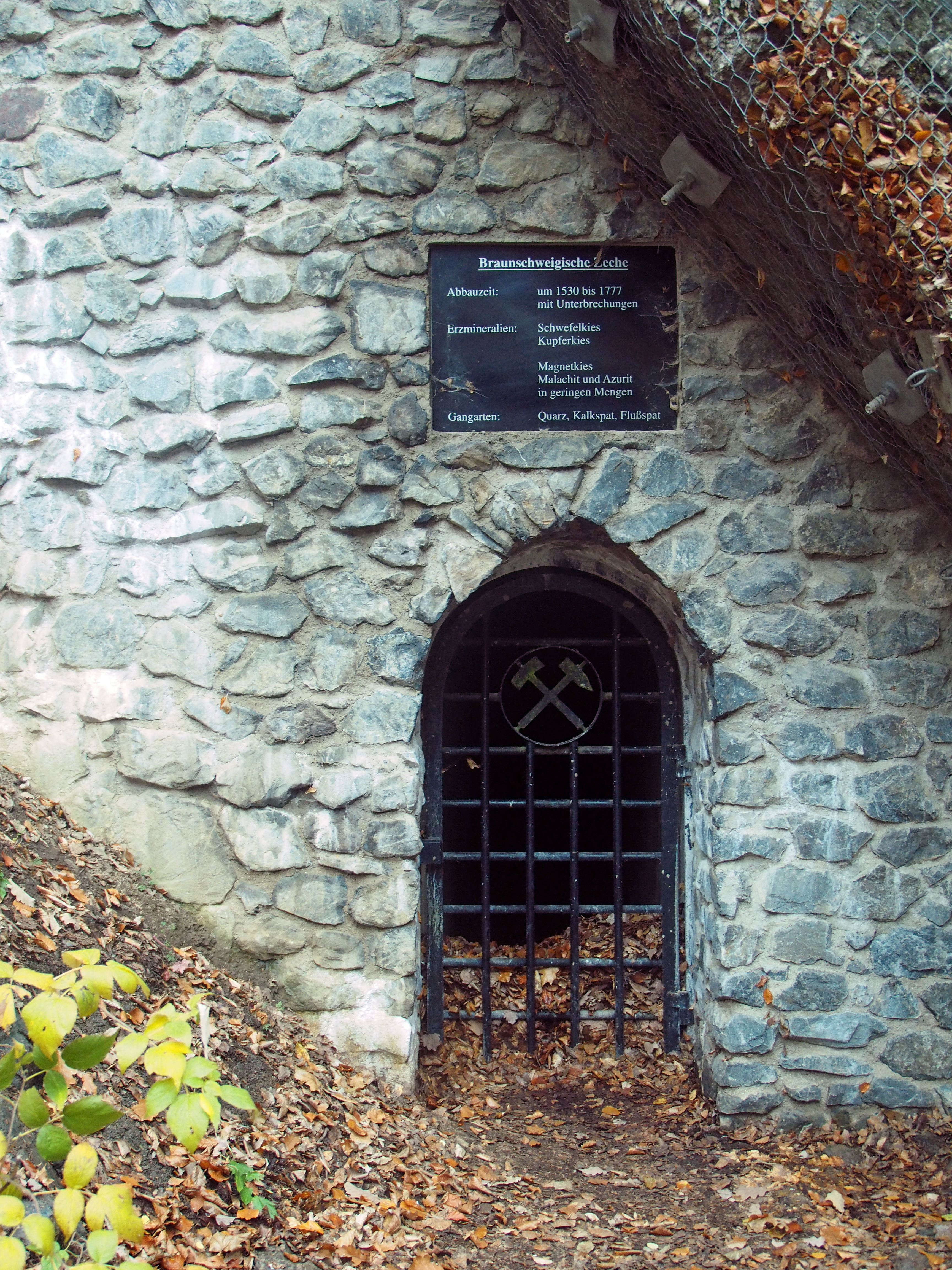 Ehemaliger Bergwerksstollen-Eingang zur „Braunschweiger Hütte“ in Treseburg (Harz)